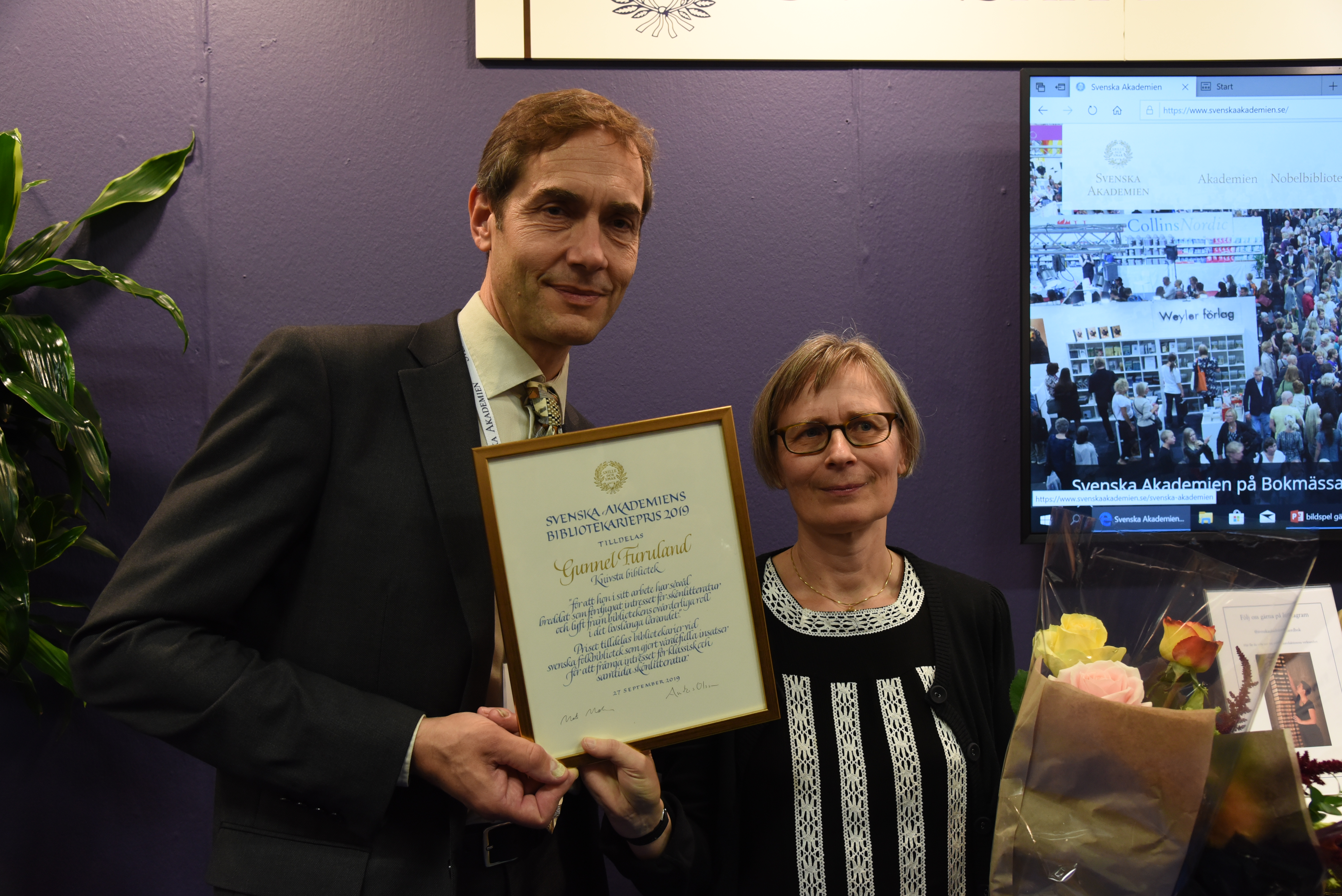 Mottagaren av Svenska Akademiens bibliotekariepris 2019, Gunnel Furuland, tillsammans med ständige sekreteraren Mats Malm. Priset utdelat på Bokmässan i Göteborg den 27 september 2019.